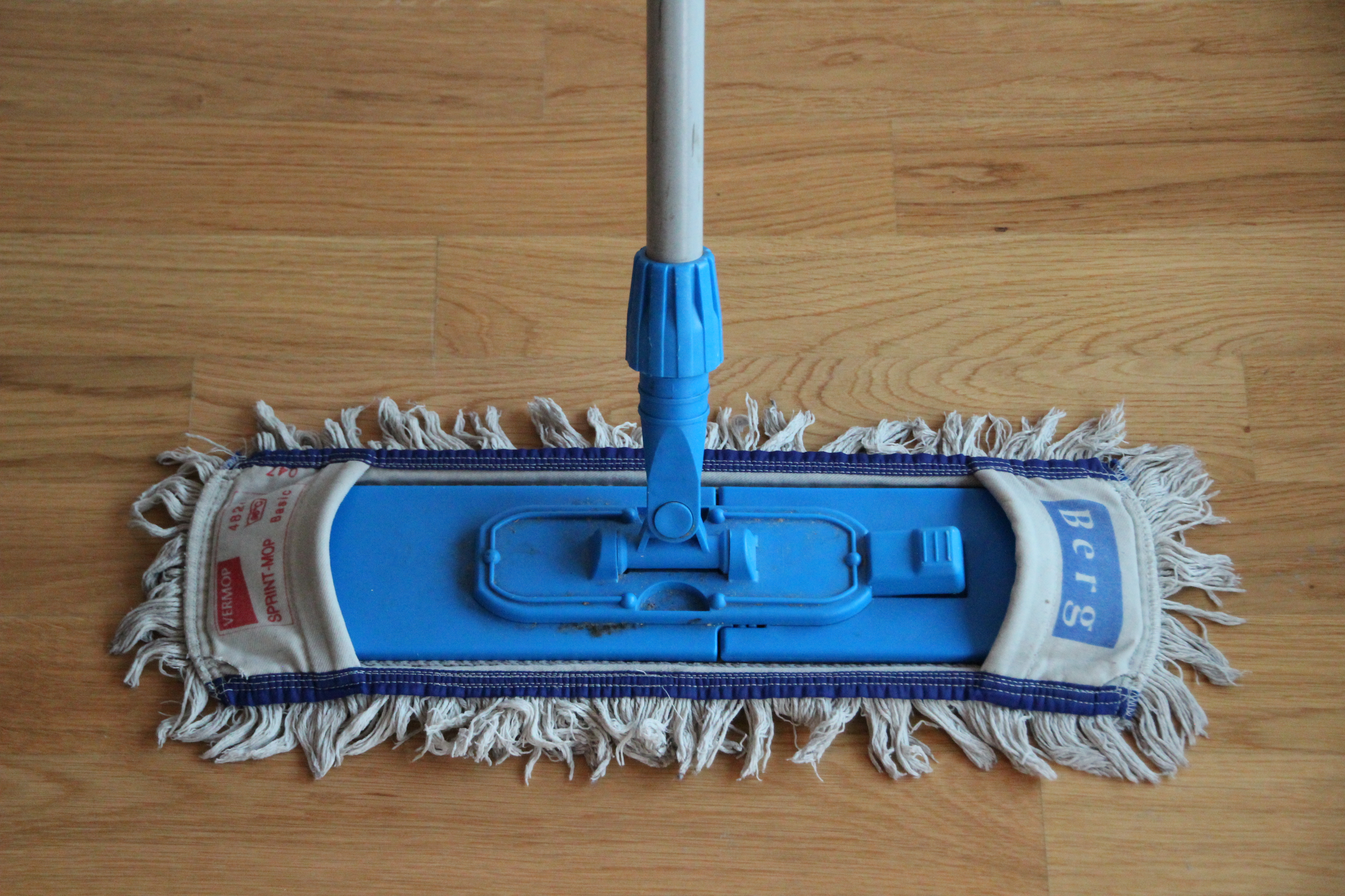 Bildinhalt: Wischmopp für den Haushalt, 40 cm breit, mit feuchtem Tuch Aufnahmeort: Frankfurt am Main, Deutschland